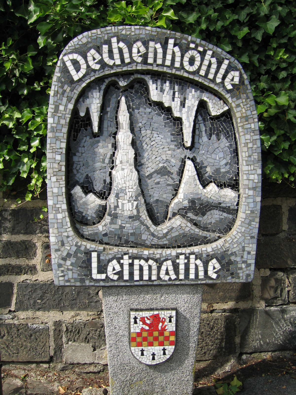 Vor der Dechenhöhle in Iserlohn-Letmathe (Germany)